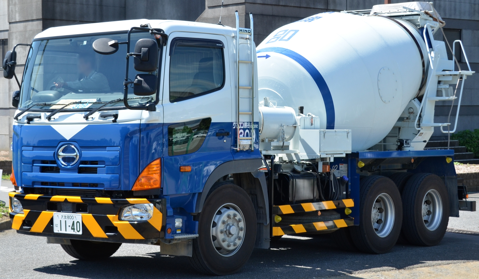 九都県市合同防災訓練に参加したクマコン熊谷のミキサー車